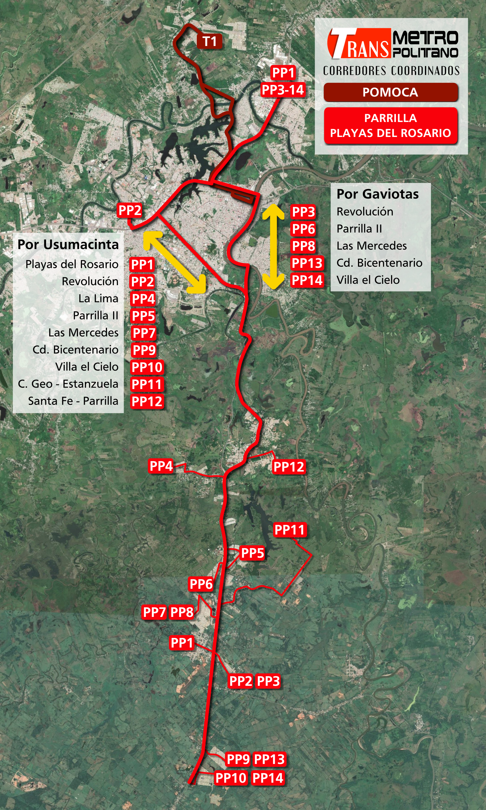 Corredores coordinados y rutas ramales del Sistema Transmetropolitano, que comunica las distintas poblaciones de la Zona Metropolitana de Villahermosa, en el estado mexicano de Tabasco.